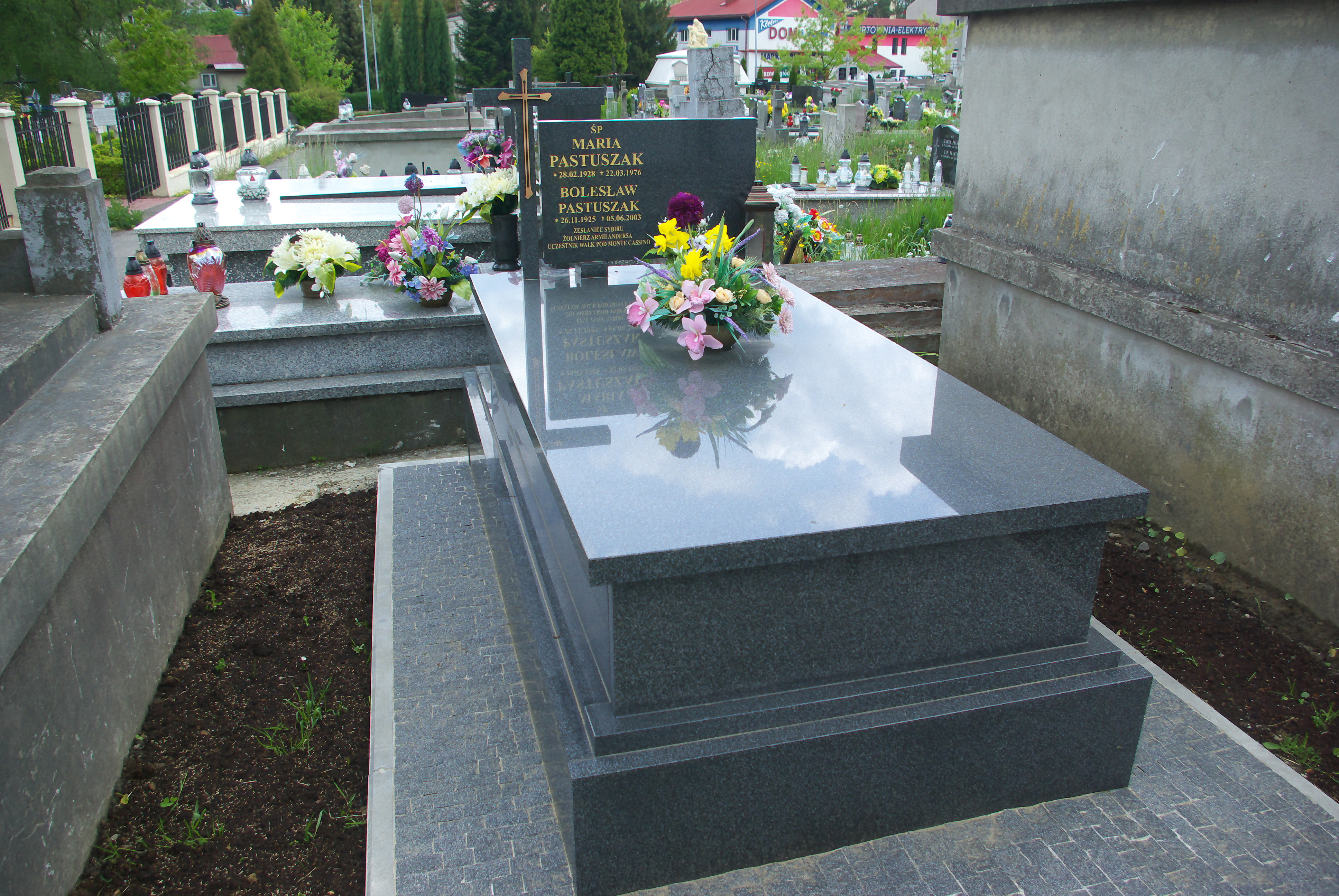 Grobowiec Bolesława i Marii Pastuszaków na Cmentarzu Centralnym w Sanoku.